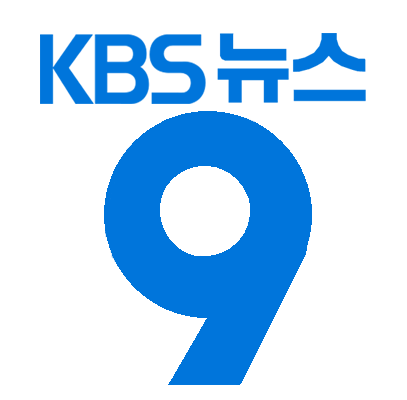 현행 KBS 뉴스 9 로고입니다.